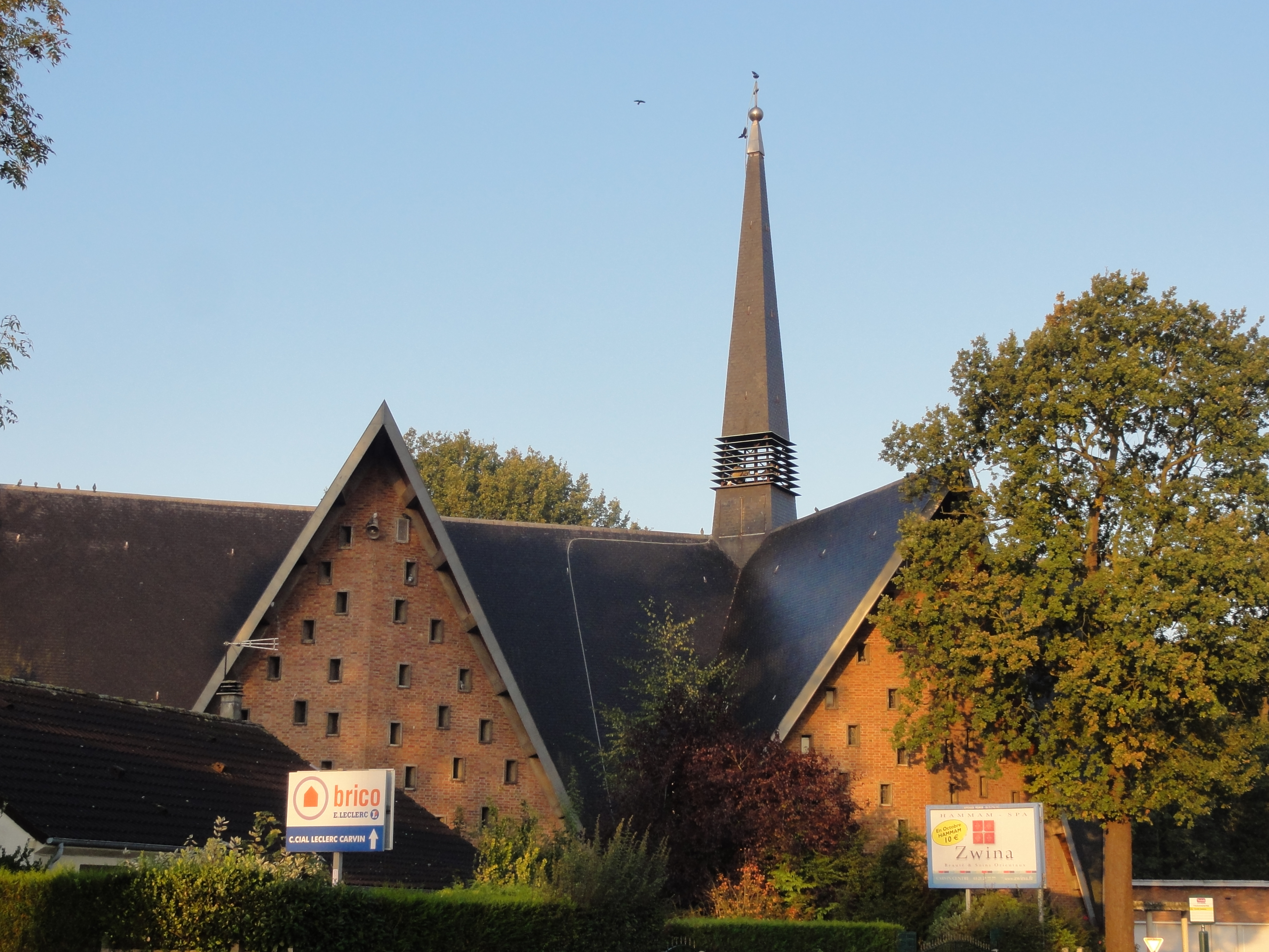 Église Saint-Henri des cités de la Fosse n° 2 de la Compagnie des mines d'Ostricourt, Libercourt, Pas-de-Calais, Nord-Pas-de-Calais, France.